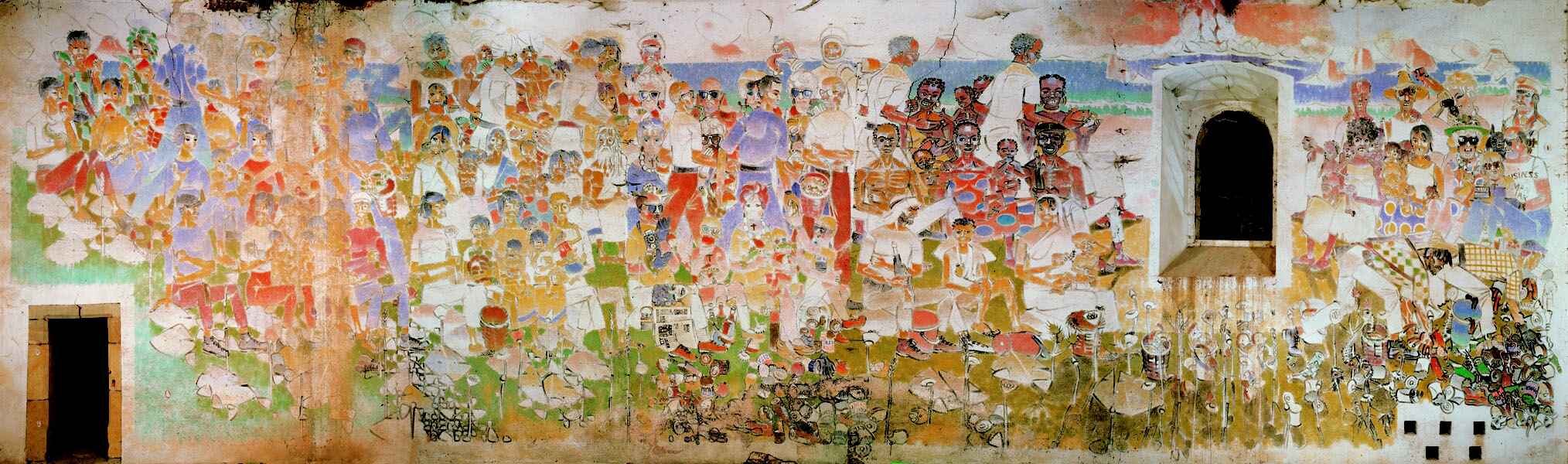 Freska v kostele sv. Petra a Pavla v Rozhovicích, s názvem Hlad od Vojmíra Vokolka